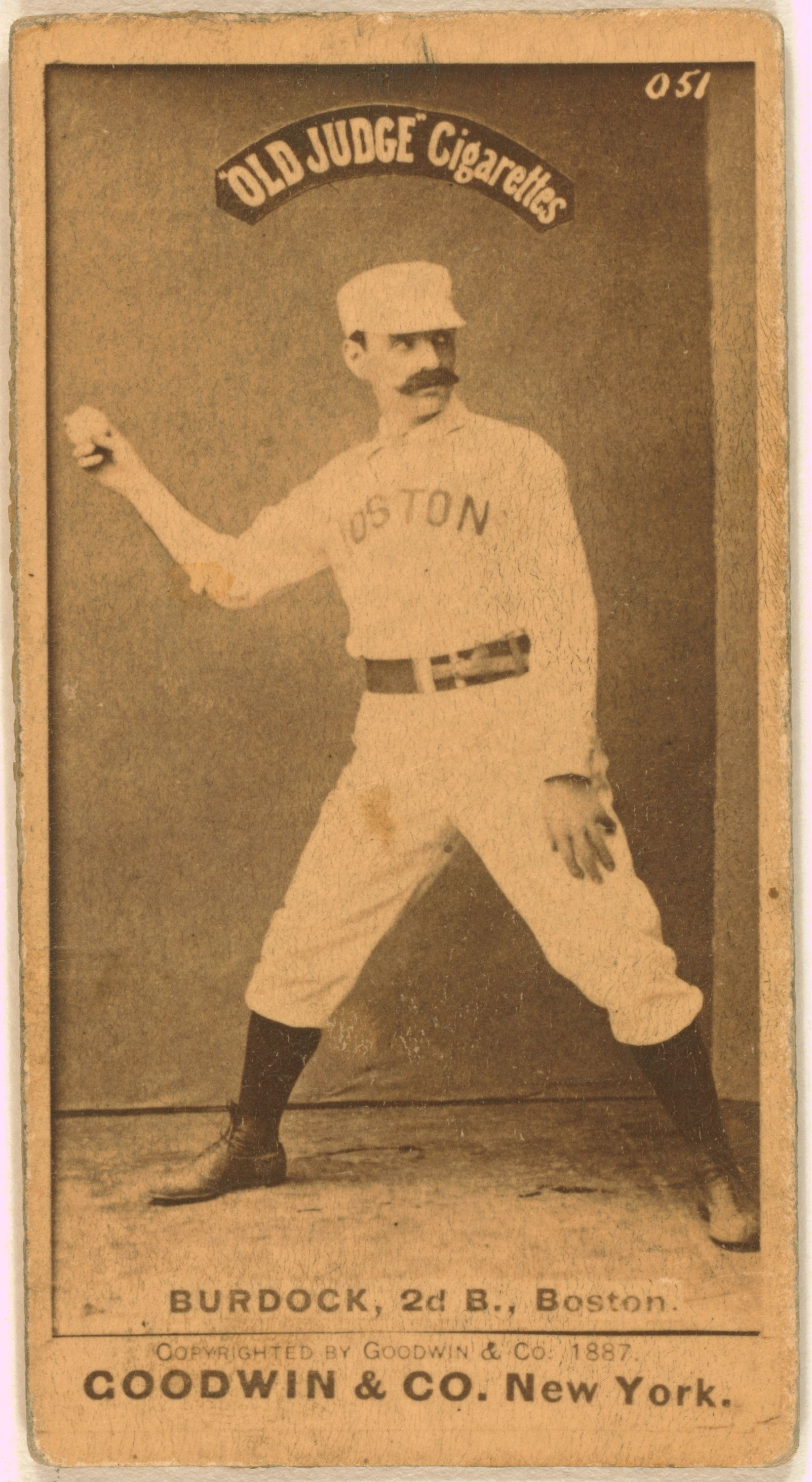 Black Jack Burdock